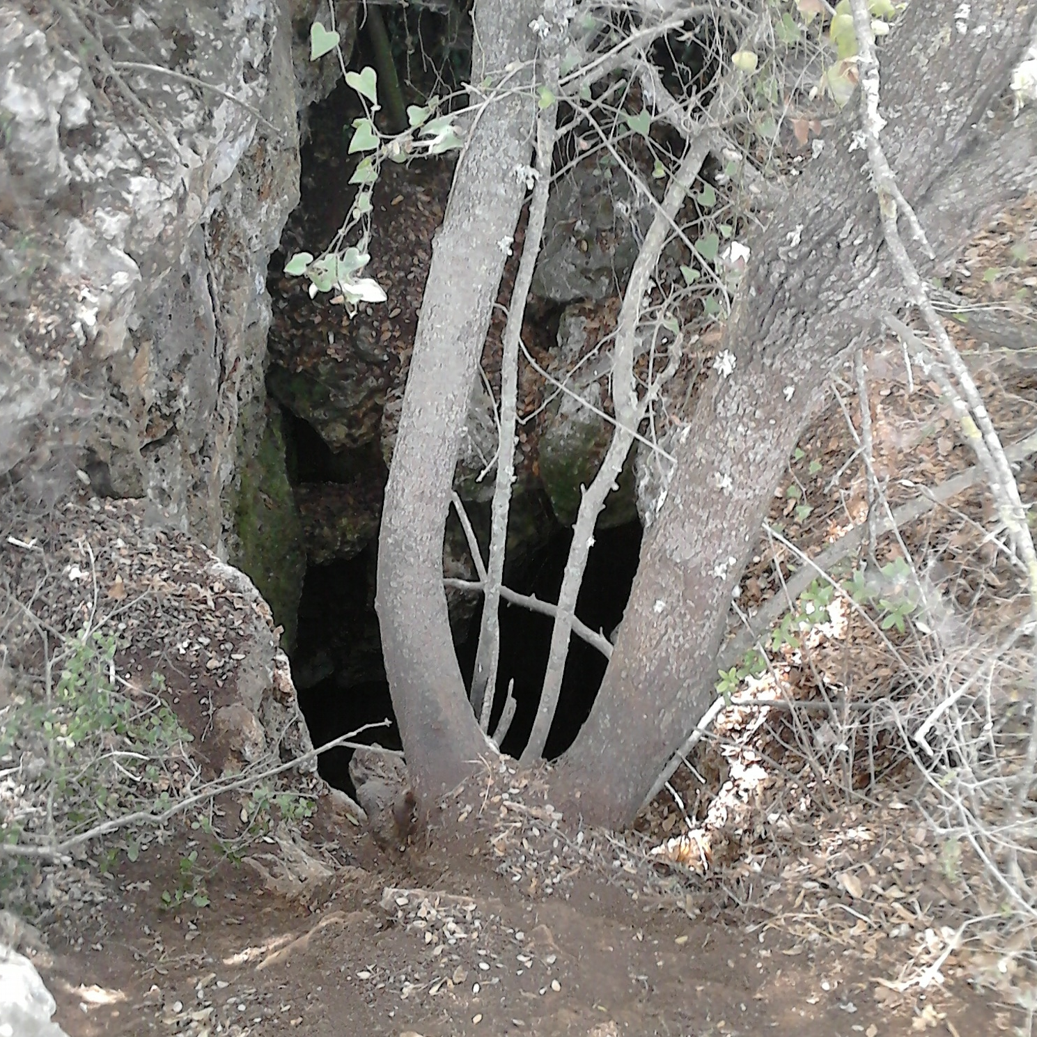 פתח הכניסה למערה העמוקה בישראל סמוך למושב שתולה